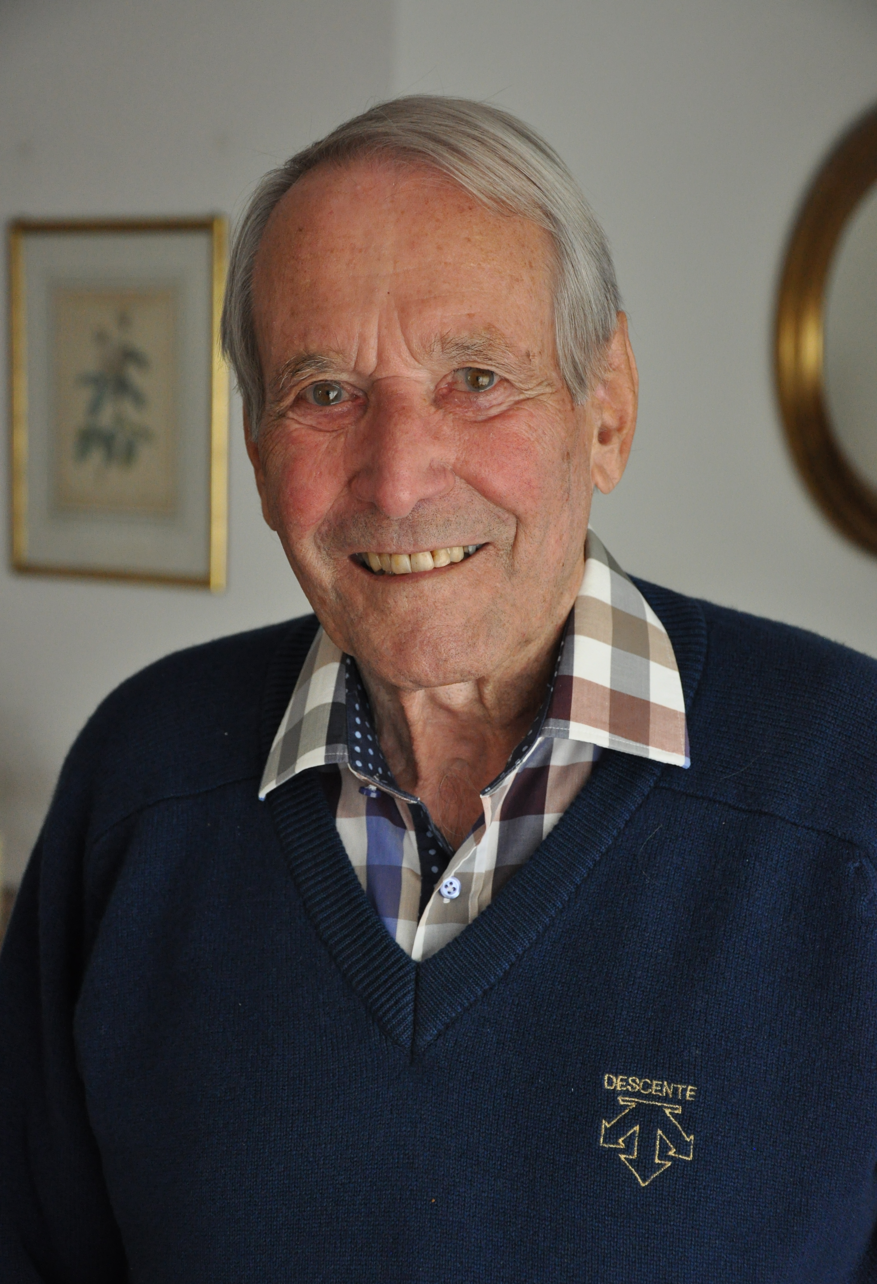 Hans Hess ist ein Schweizer Erfinder und Pionier im Bereich Sportbekleidung. Die Aufnahme ist von 2013